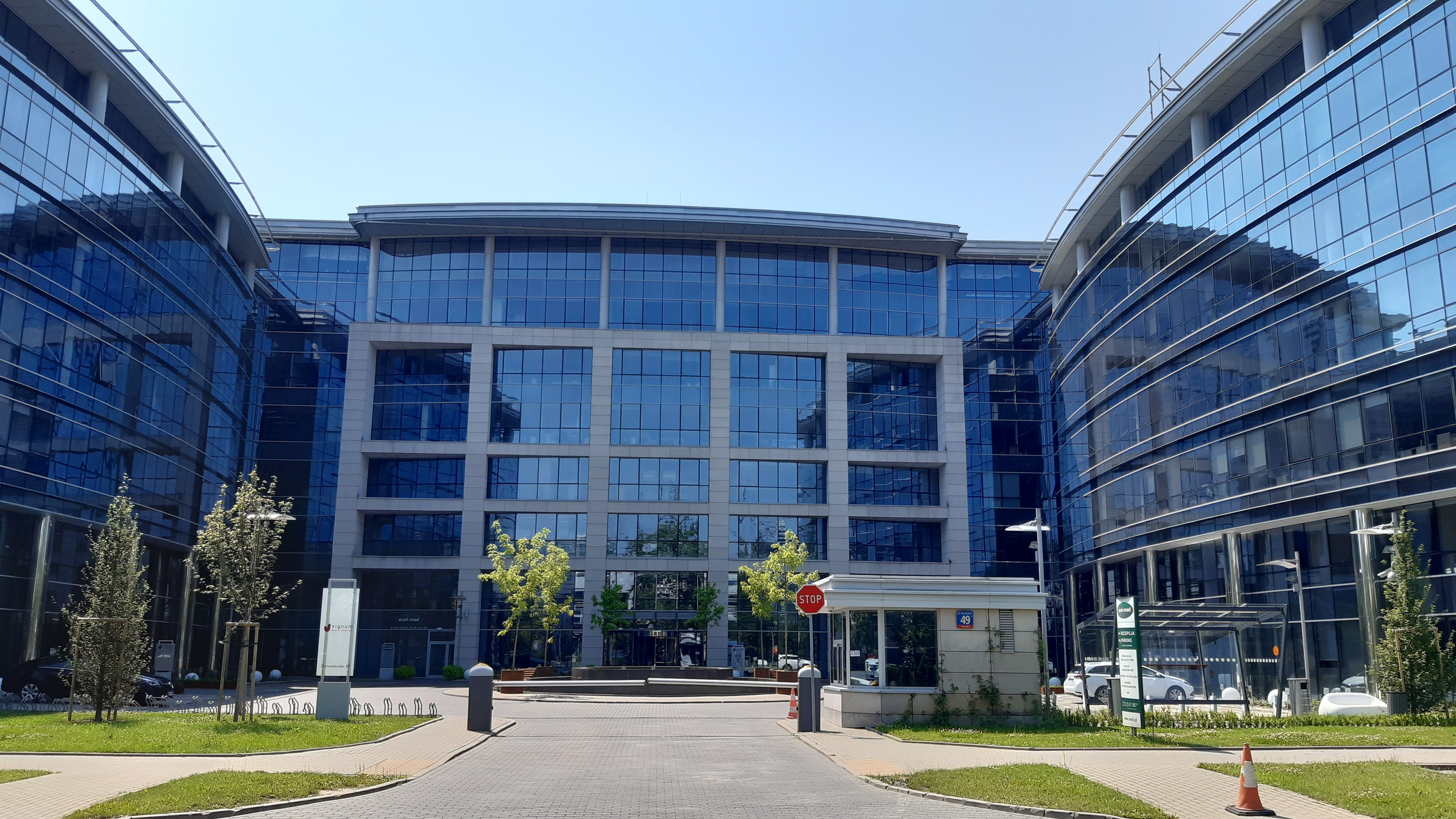 siedziba Ringier Axel Springer Polska w Warszawie, ul. Domaniewska 49